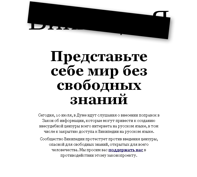 Внешний вид Русской Википедии во время забастовки 10 июля 2012.